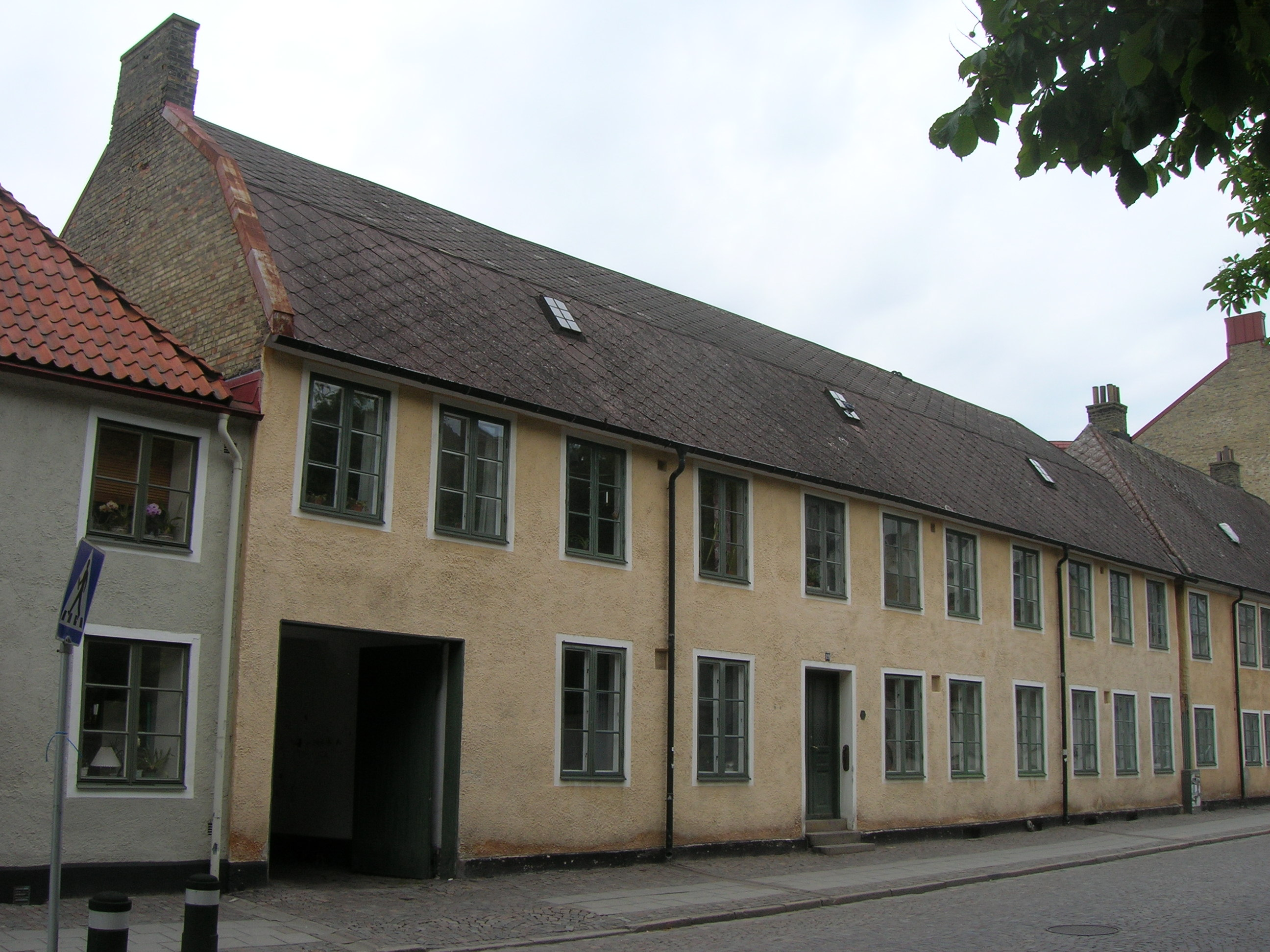 Kulturminnesmärkt hus på Bredgatan 19 i kvarteret Sankt Peter i Lund, Skåne, Sverige.